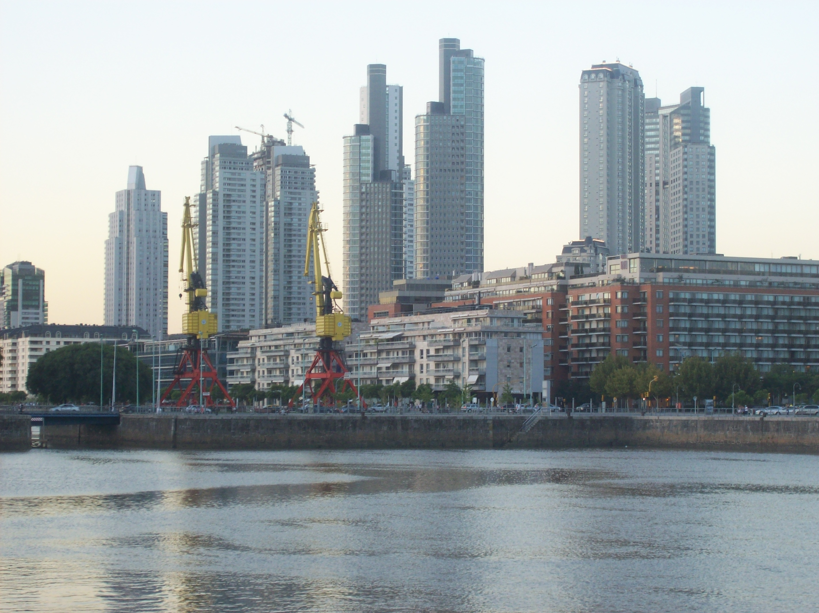 Edificios de Puerto Madero, ciudad de Buenos Aires, al anochecer.